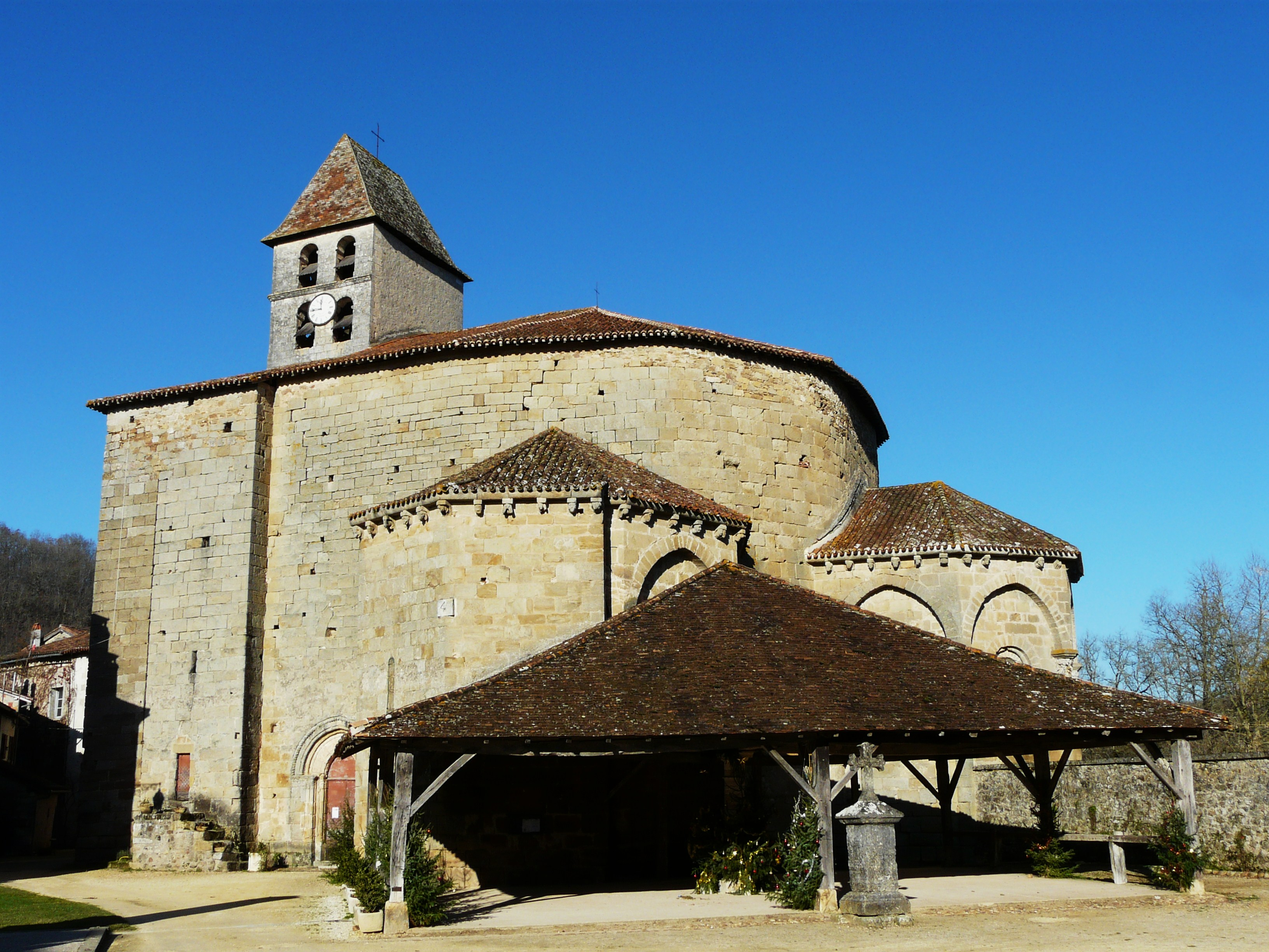 La halle et l'église Saint-Jean Baptiste, Saint-Jean-de-Côle, Dordogne, France Object location45° 25′ 17.6″ N, 0° 50′ 17.5″ E